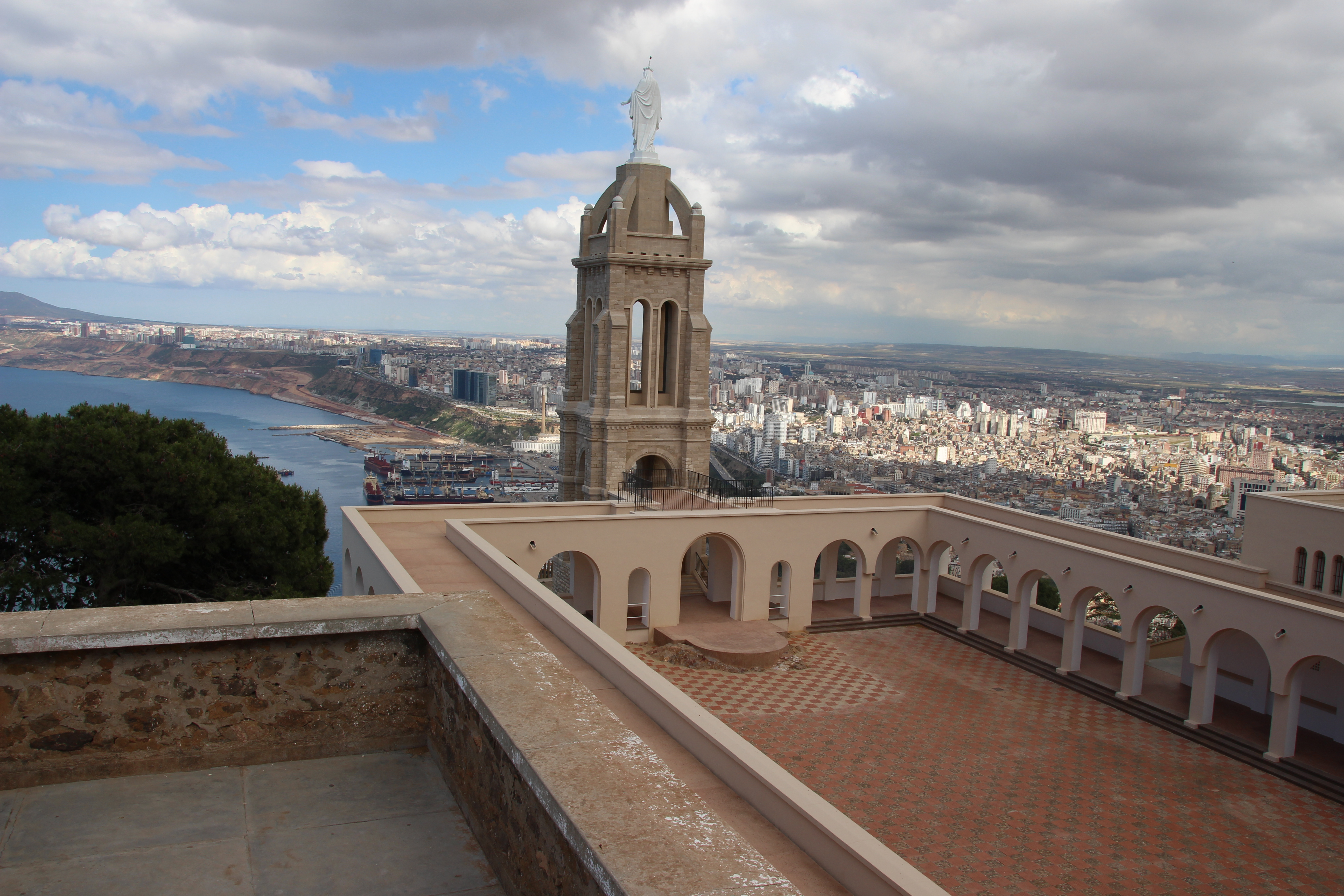 Le fort de Santa-Cruz a été érigé entre 1577 et 1604 dans la ville d'Oran, en Algérie, par les Espagnols. Ce fort a été un lieu de combats sanglants opposant Ottomans et Maures vassaux aux Espagnols et tribus arabes alliées. Ce fort se situe sur la crête du massif de l'Aïdour. Sa situation en faisait alors un point stratégique.